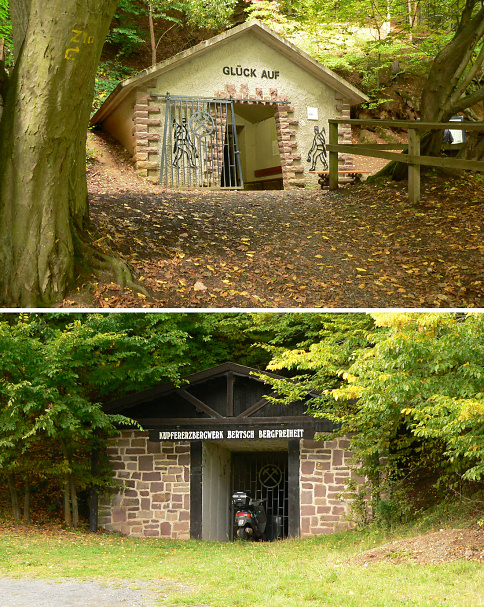 Besucherbergwerk obere und untere Sohle in Bergfreiheit